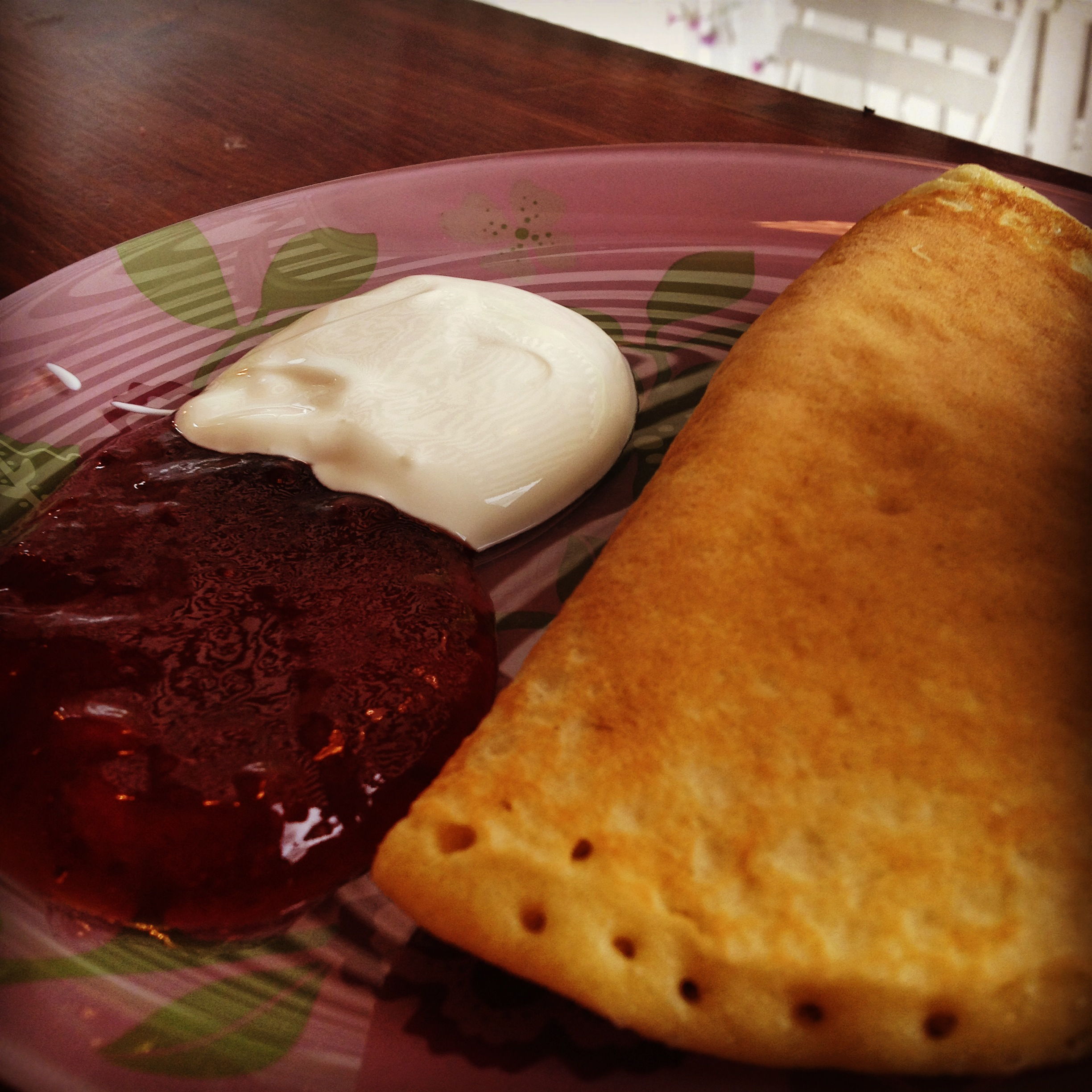 Svele